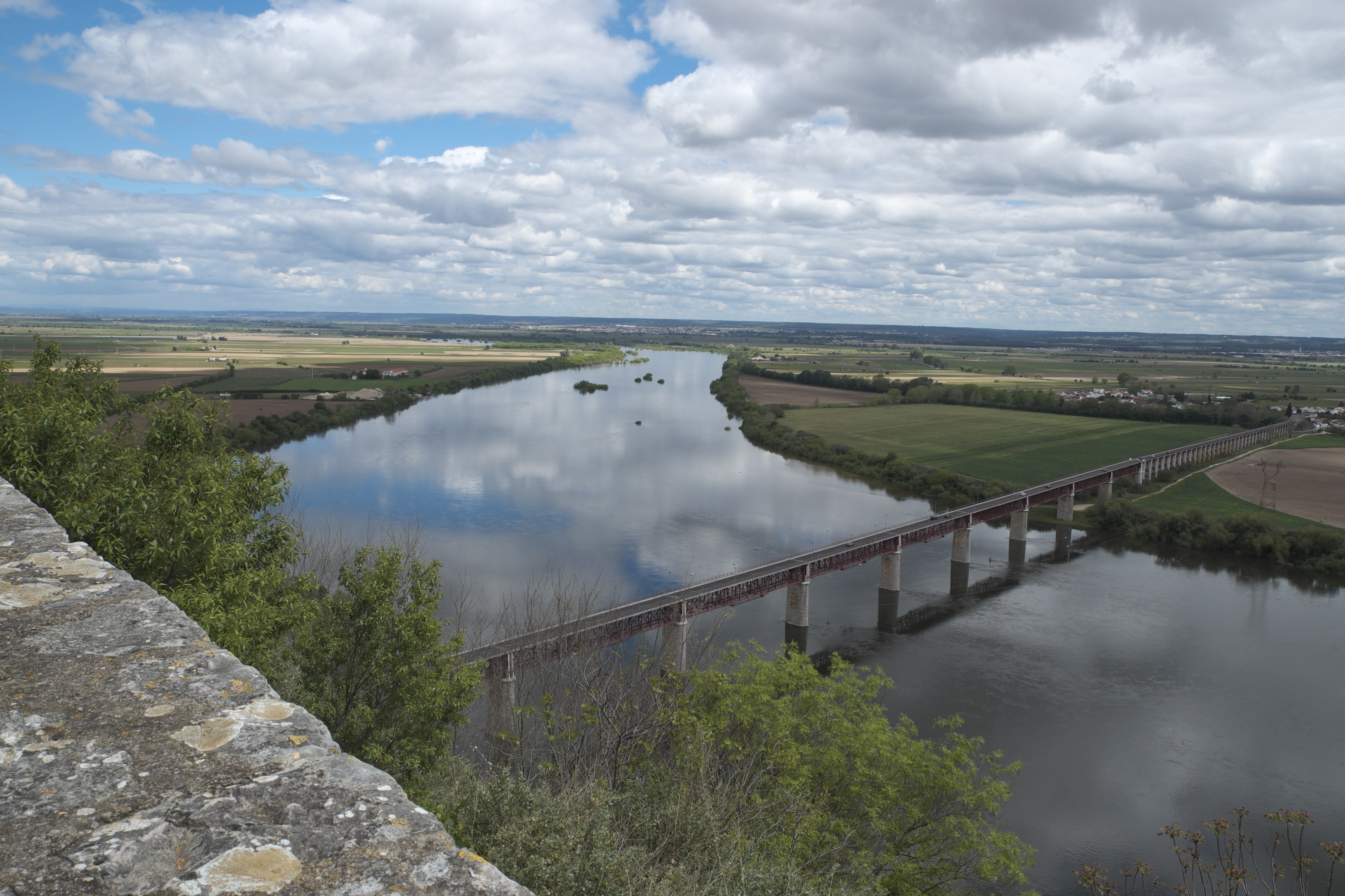 Tajo und Brücke Ponte de D. Luís in Santarém in Portugal